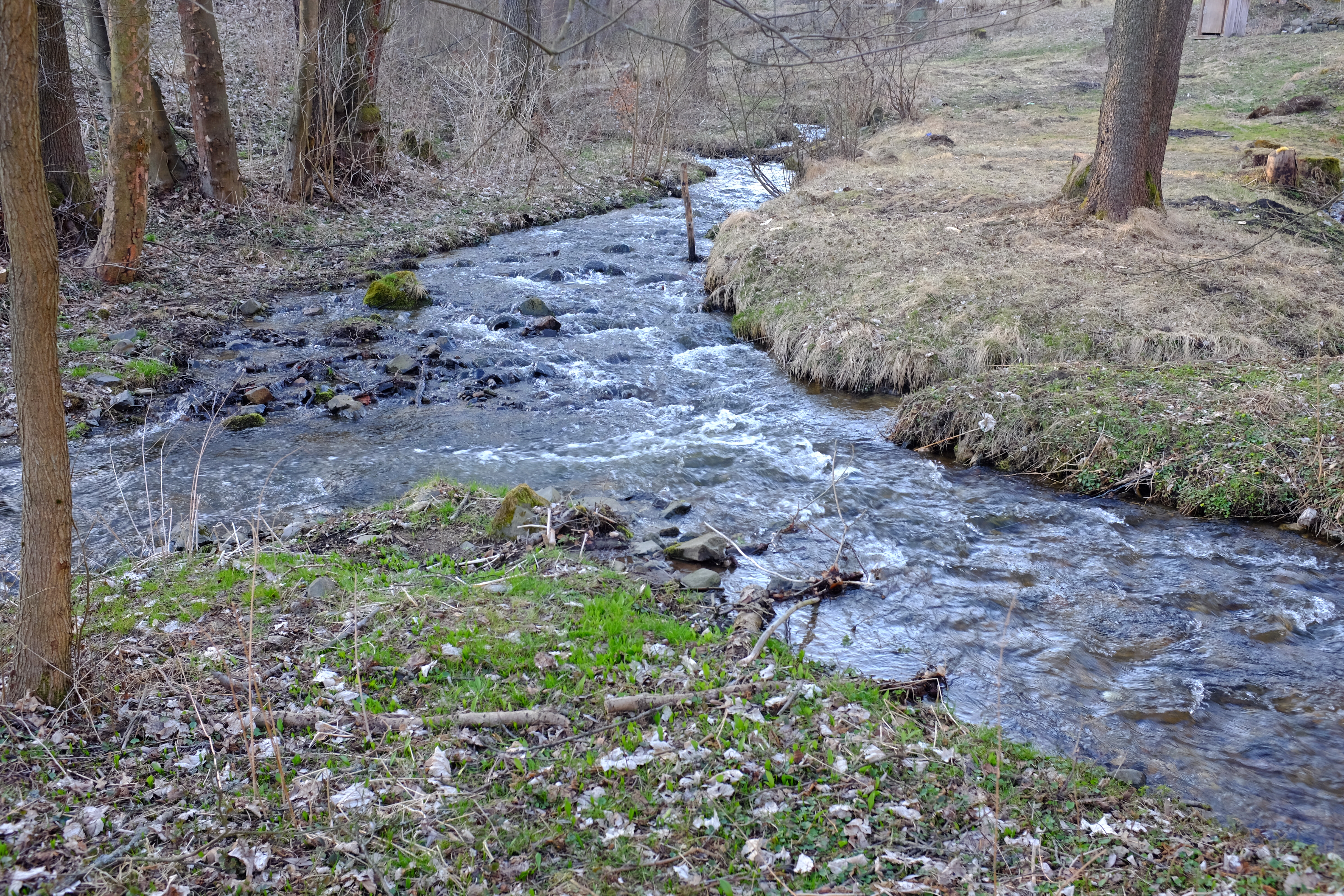 Soutok Hornohradského a Osvinovského potoka pod Horním Hradem, okres Karlovy Vary